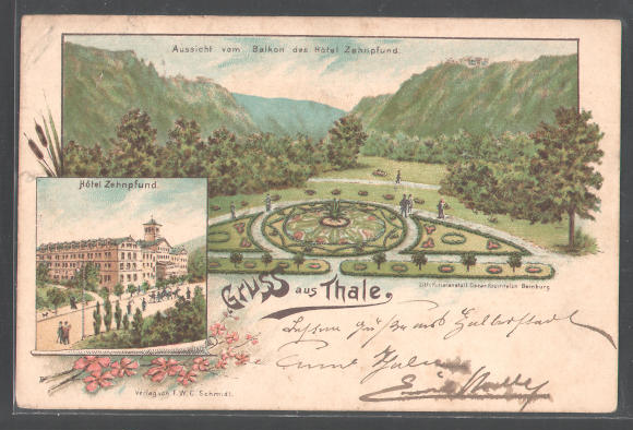 Thale, Blick vom Balkon des Hotels Zehnpfund und Hotel Zehnpfund